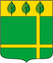 Герб города Черепаново Новосибирской области